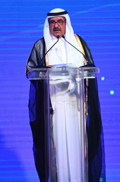 حمدان بن راشد آل مكتوم في الحفل العاشر للجائزة